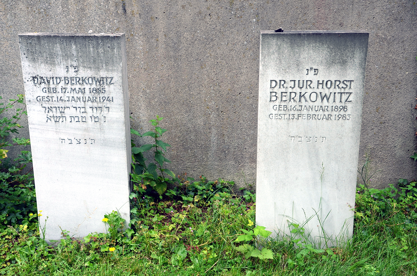 Die Grabsteine von David Berkowitz (17. Mai 1855 - 14. Januar 1941) sowie „Dr. jur. Horst Berkowitz“ (16. Januar 1898 - 13. Februar 1983) vor der Mauer vom Jüdischen Friedhof Bothfeld in Hannover ...